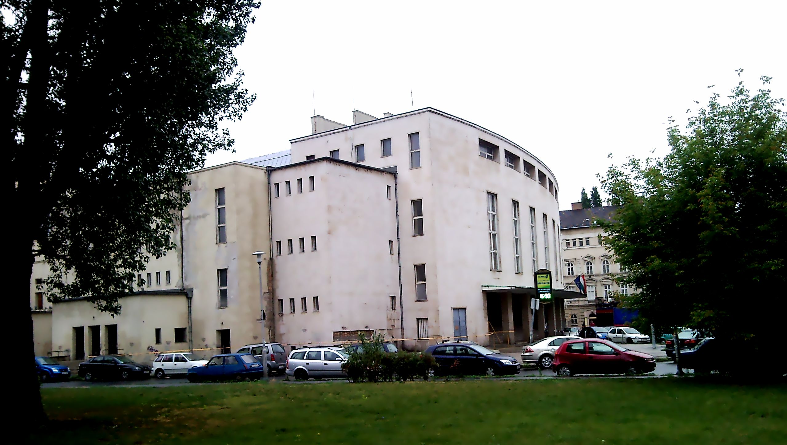 Erkel Színház felújítás előtt, Budapest